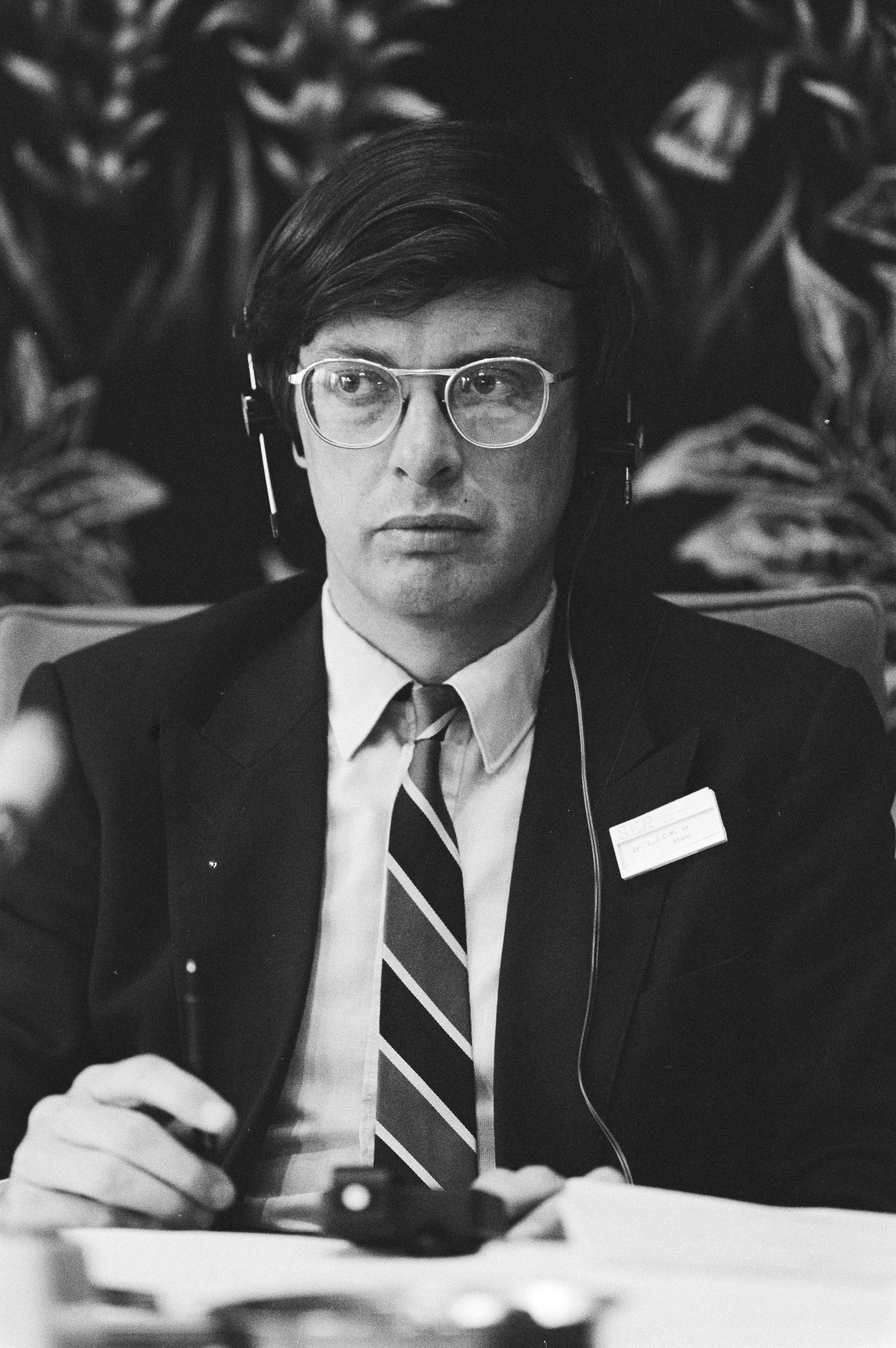 Collectie / Archief : Fotocollectie Anefo Reportage / Serie : [ onbekend ] Beschrijving : Tweedaagse symposium in SER-gebouw t.g.v. 200-jarig bestaan handelsbetrekkingen tussen Nederland en Amerika; dr. L. J. C. M. le Blanc , kop Datum : 7 mei 1982 Locatie : Nederland Trefwoorden : SYMPOSIA Instellingsnaam : SER Fotograaf : Dijk, Hans van / Anefo Auteursrechthebbende : Nationaal Archief Materiaalsoort : Negatief (zwart/wit) Nummer archiefinventaris : bekijk toegang 2.24.01.05 Bestanddeelnummer : 932-1466